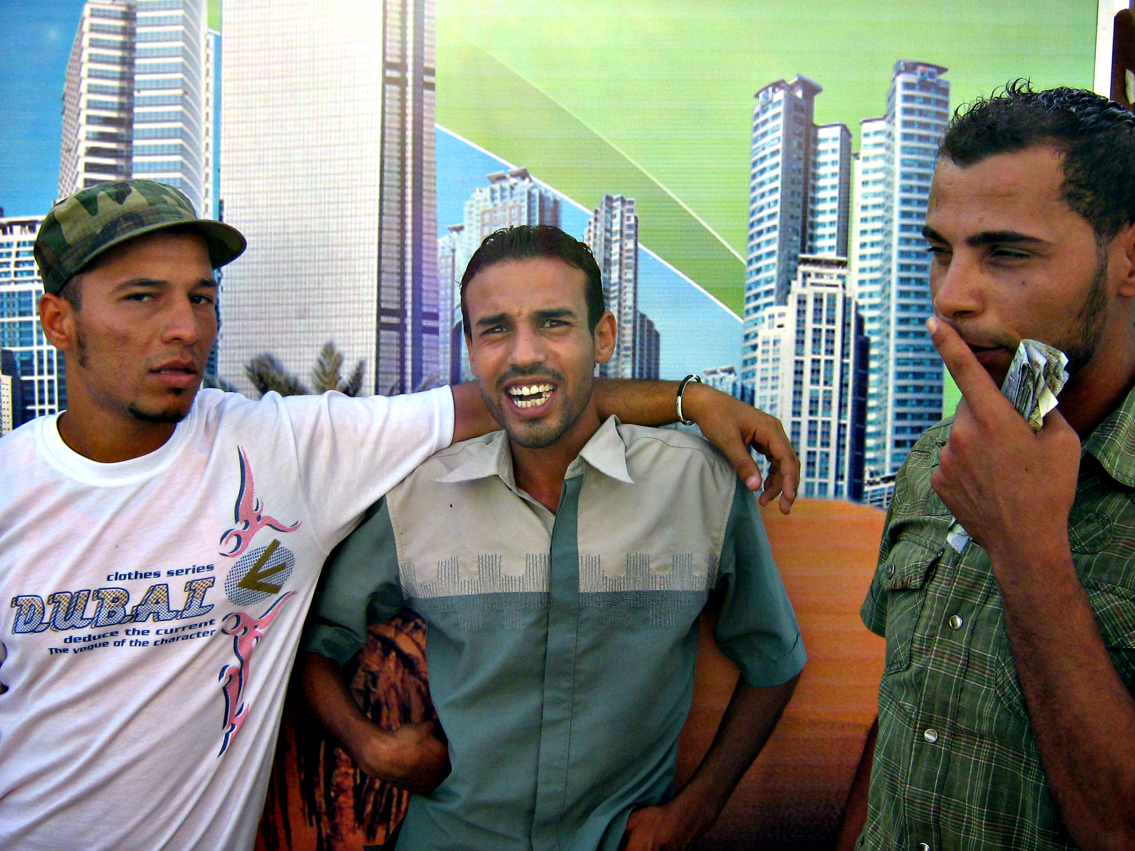 Жители Триполи, Ливия.